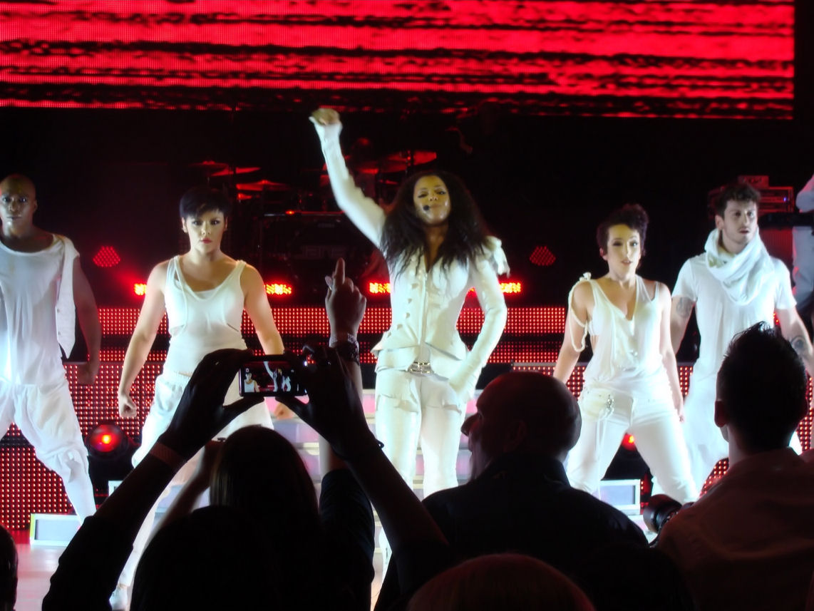 16 - Janet Jackson - Royal Albert Hall 2-7-2011